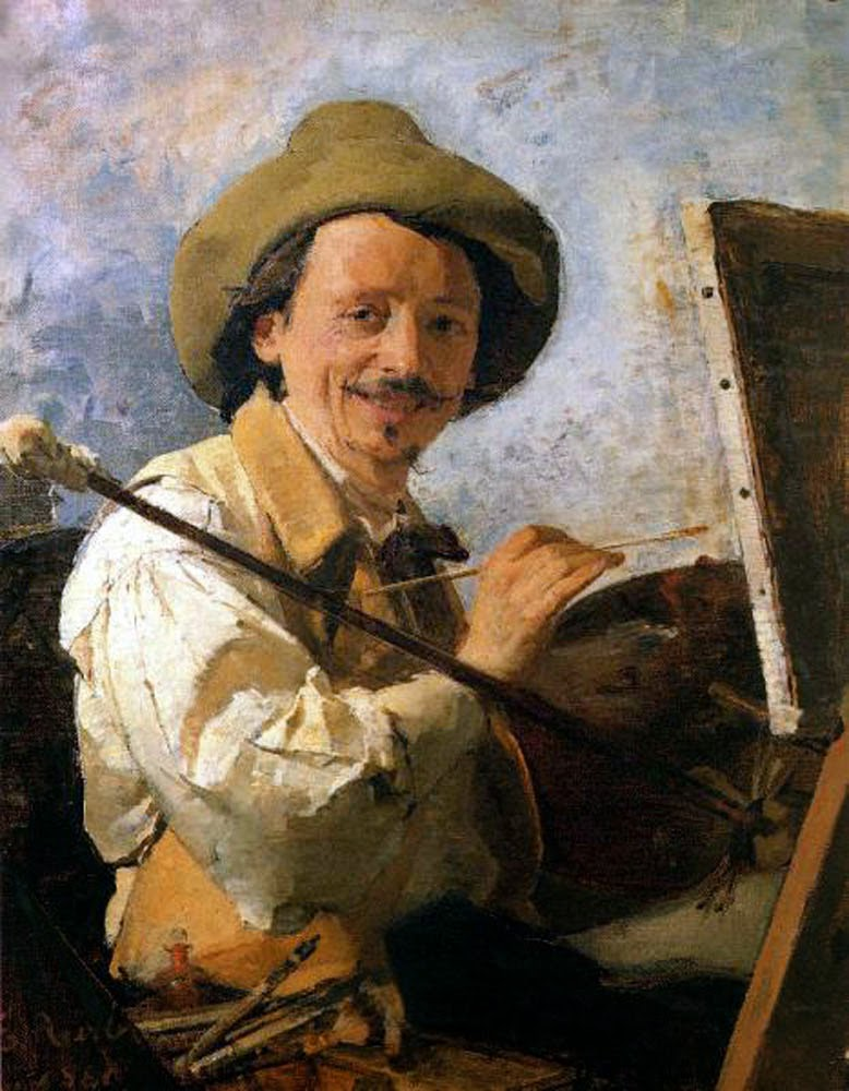 "Autoritratto", Pavia, Scuola civica